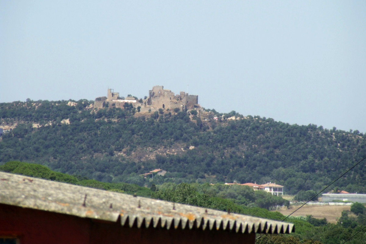 Castell de Palafolls - Catalunya, Espanya